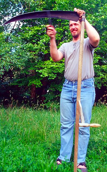 Wetzen einer Sense